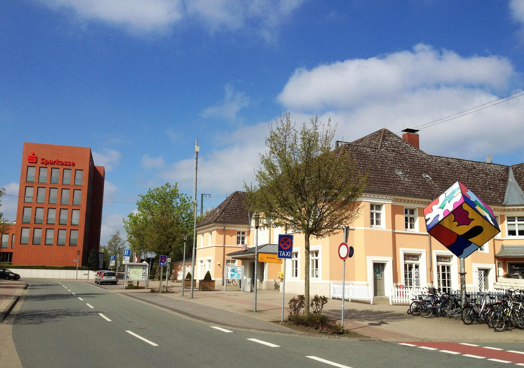 Oelder Bahnhof mit Otmar-Alt-Würfel